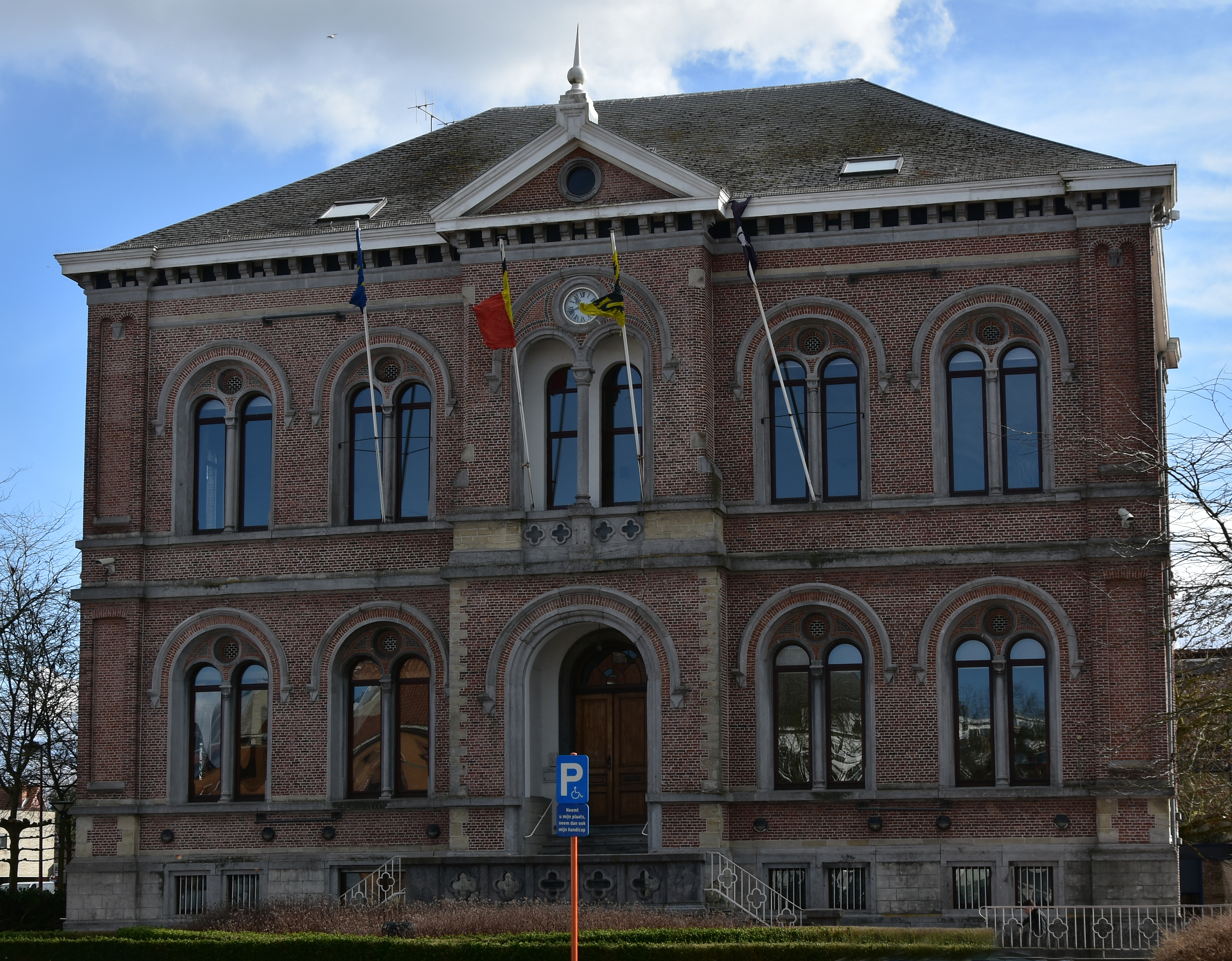 Asse gemeentehuis (76659) 12-02-2020 14-08-21